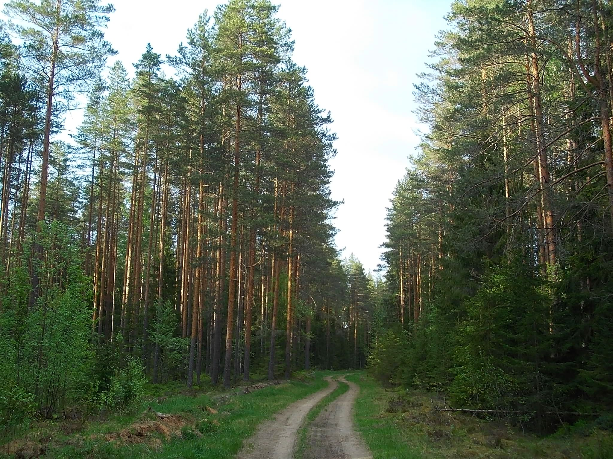 Дорога в Ракитинском заказнике